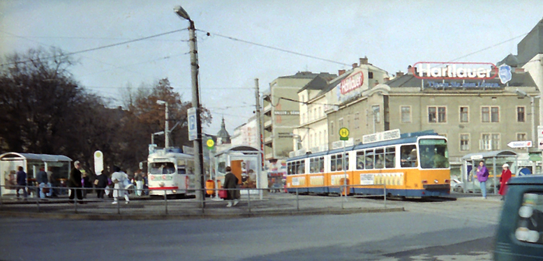 Die Straßenbahnhaltestellen am ehemaligen Blumauerplatz in Linz. Links eine Straßenbahn der Linie 3 (Bergbahnhof Urfahr–Hauptbahnhof Linz), rechts von Linie 1 (Universität–Auwiesen). Aufnahme mit einer Einwegkamera (Fuji QuickSnap Panorama). Scan von Negativ, Bildausschnitt